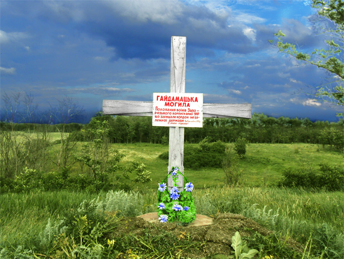 Гайдамацька могила: Поховання вояків Запорозького корпусу армії УНР, що захищали кордон незалежної держави. Червень-жовтень 1918 р.